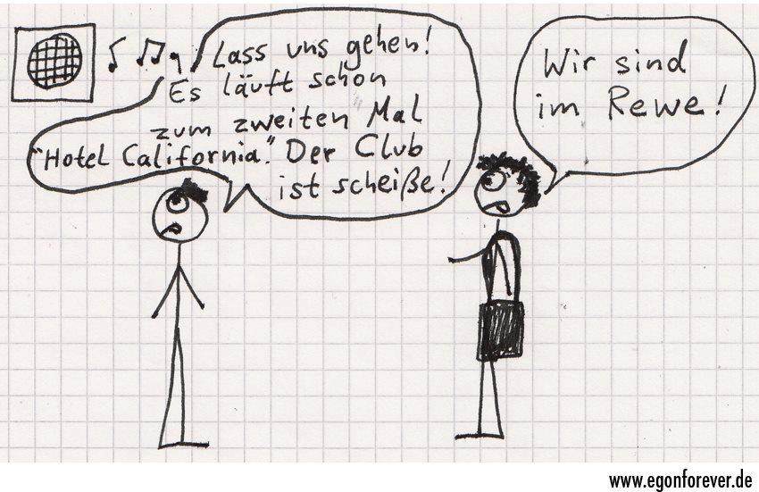 Egon Forever! Strichfiguren Cartoon von Andre Lux